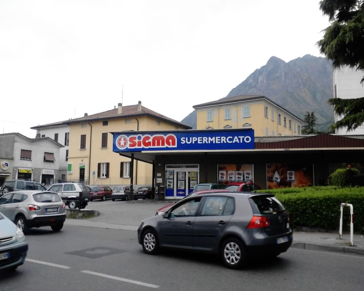 Sigma Market in Valmadrera ITALY